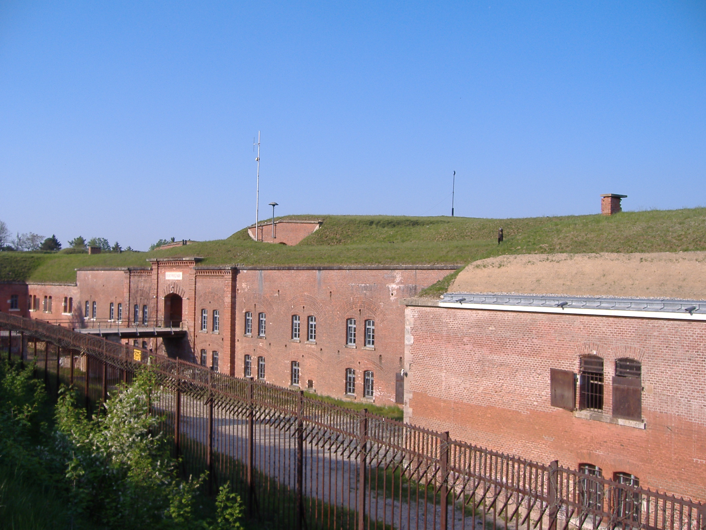 Fort Prinz Karl, in Landesfestung Ingolstadt, Bayern (ehemaliges Fort VI.)